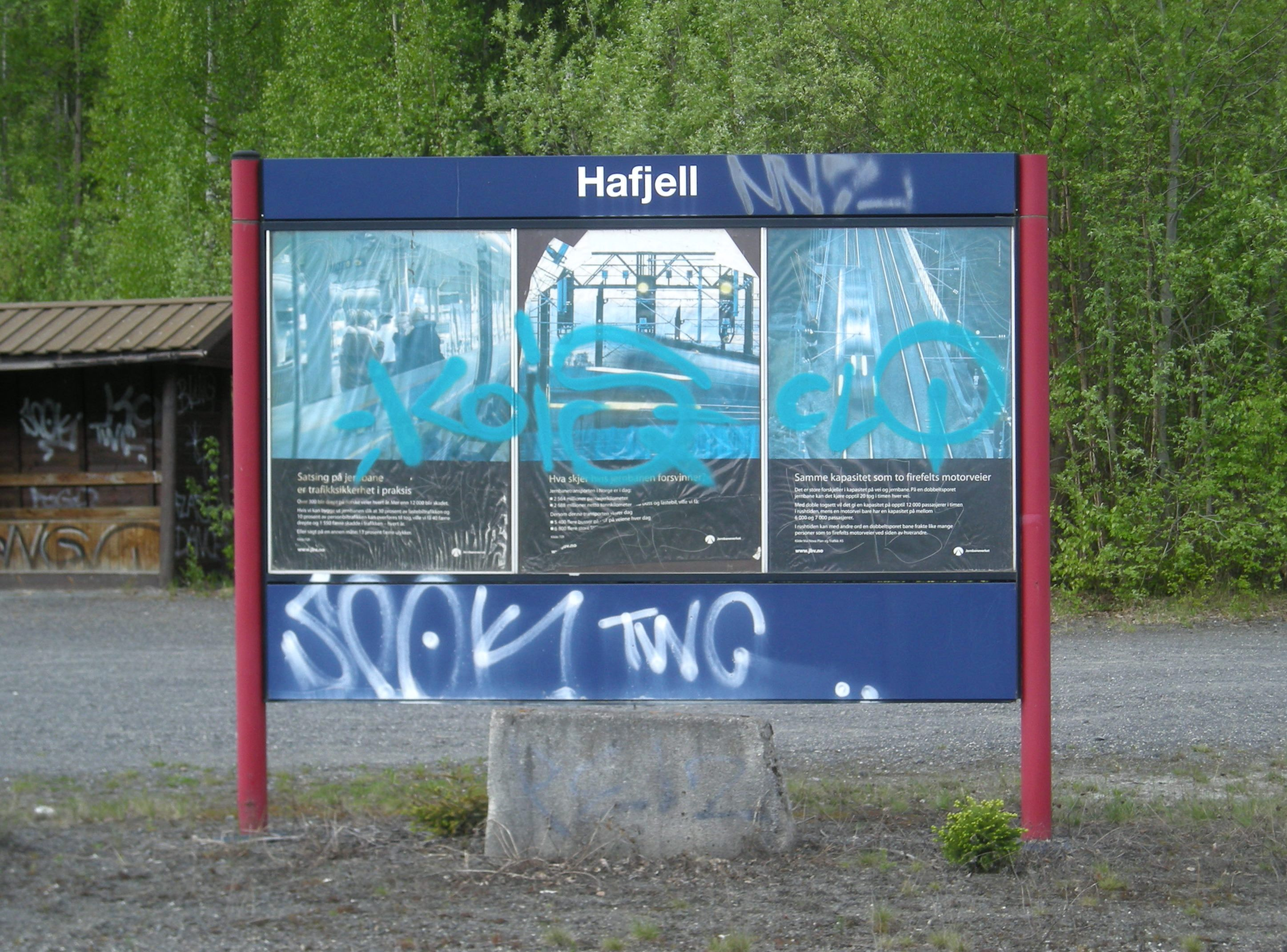 Hafjell holdeplass på Dovrebanen